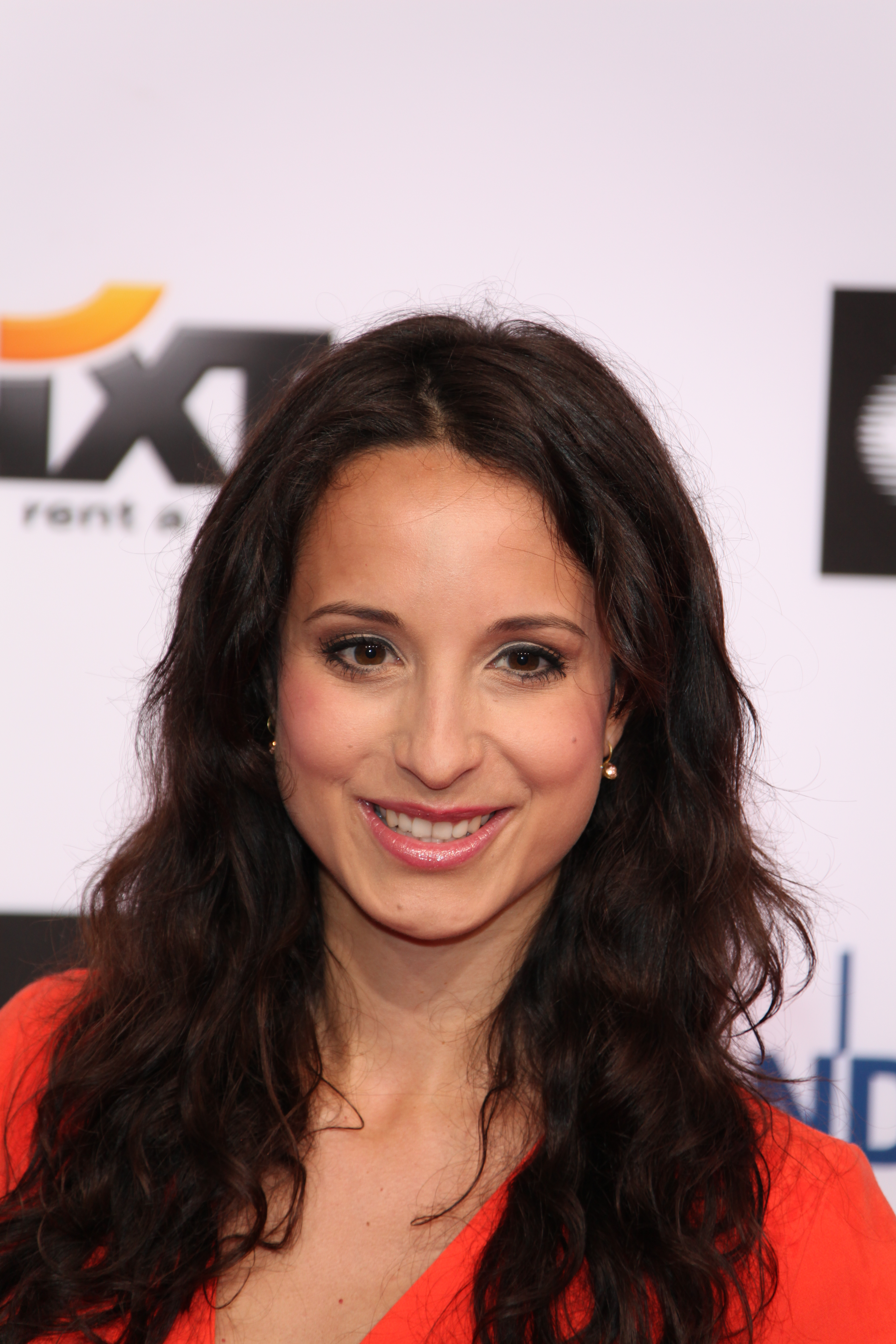 Studio Hamburg Nachwuchspreis 2012 Stephanie Stumph